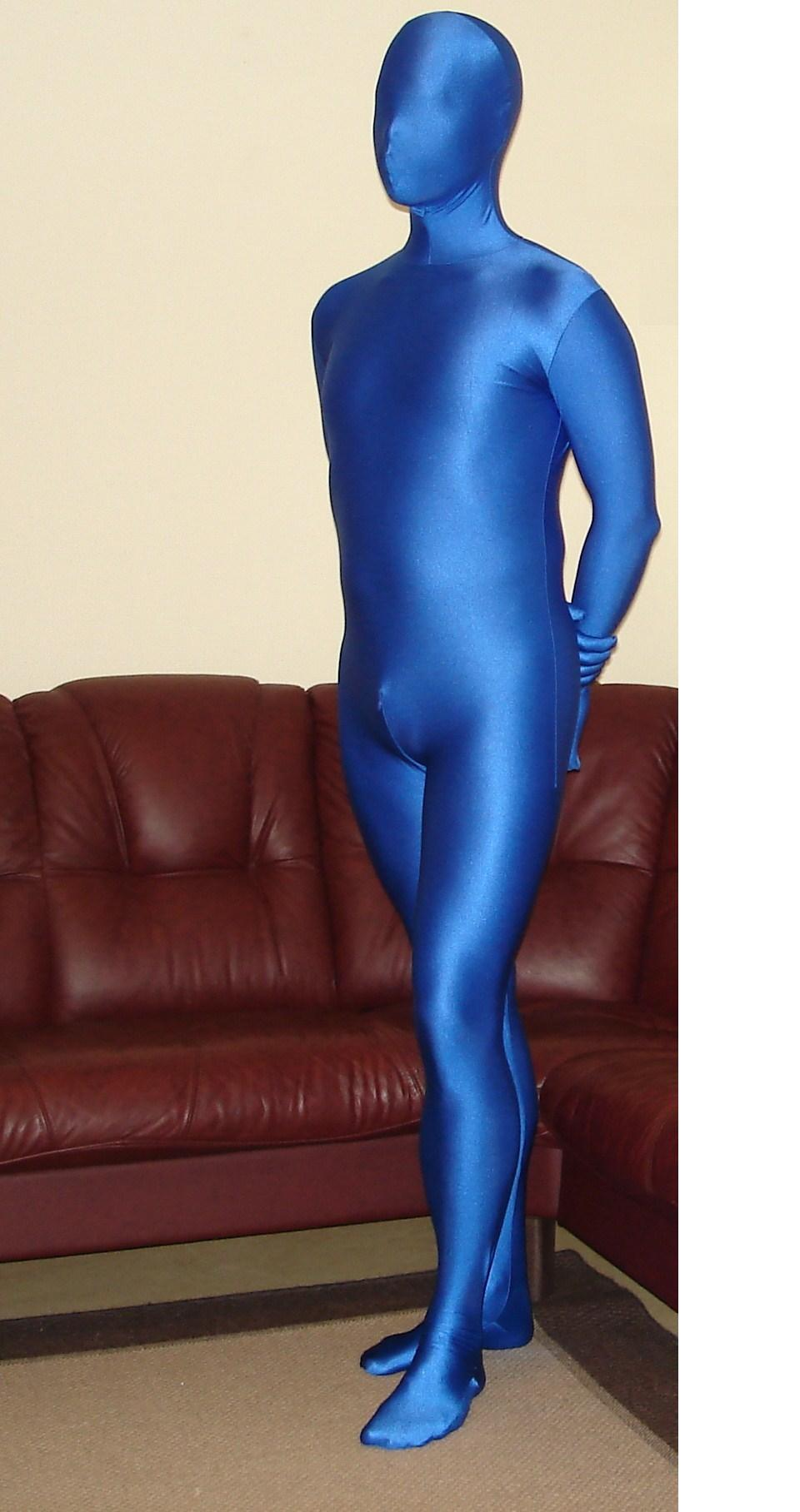 A blue Zentai suit